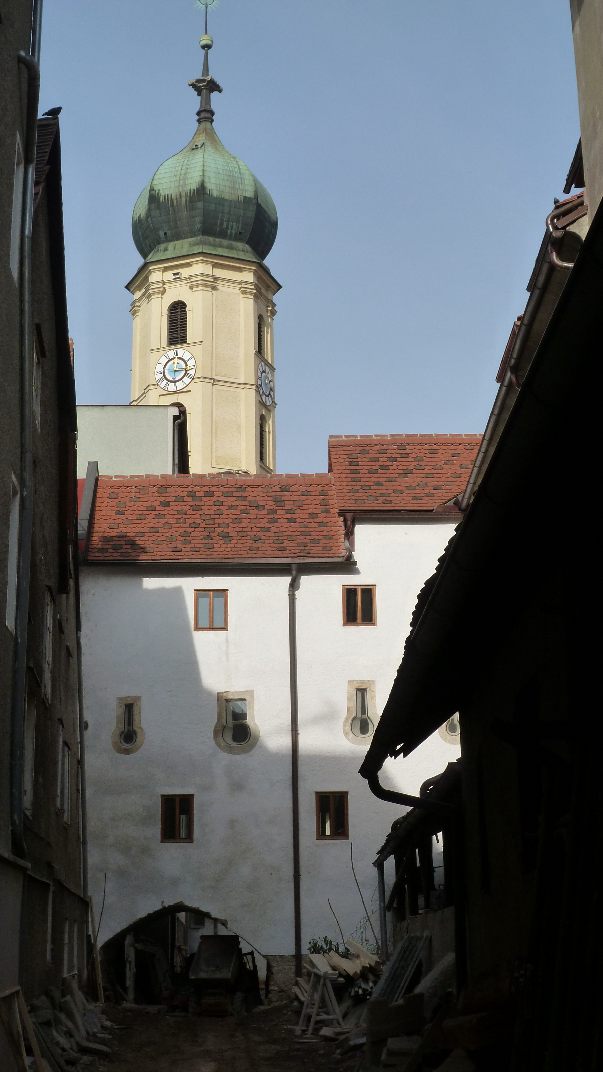 Franziskanerkloster und Teil der ehem. Stadtmauer mit Zwinger